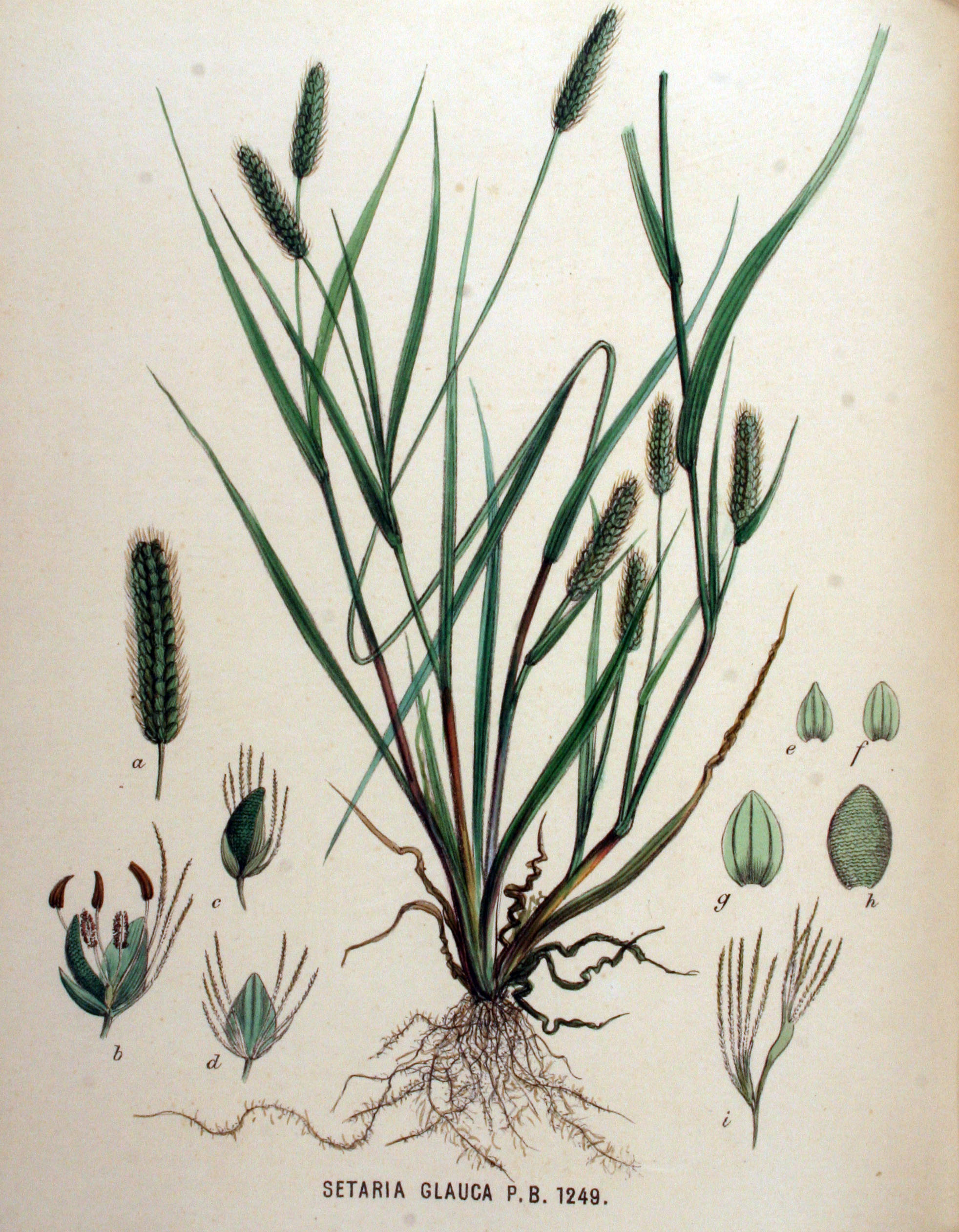 Setaria pumila (Poiret) Roem. & Schult. (Syn. Setaria glauca auct non (L.) Beauv.)